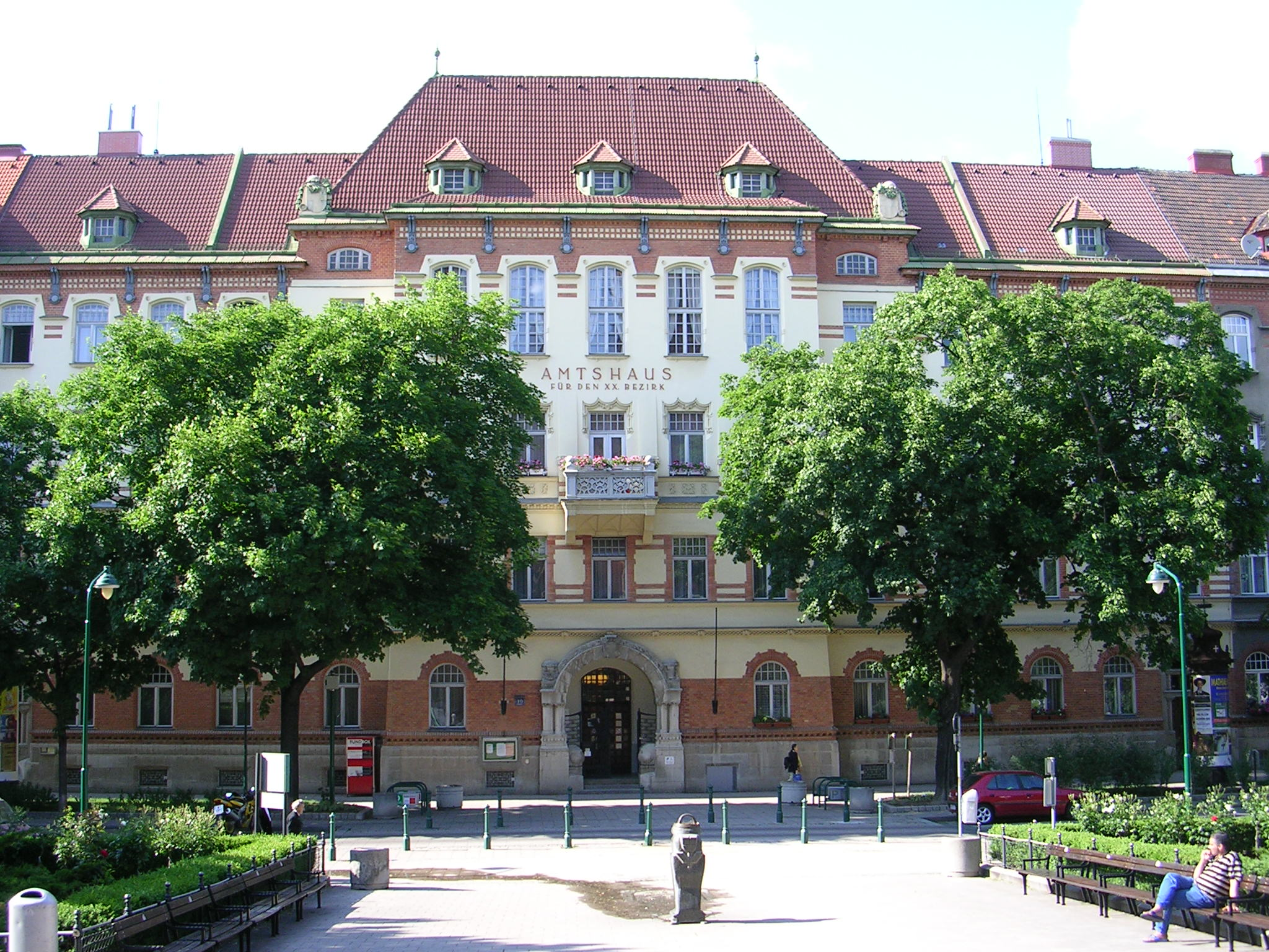 Bezirksamt Brigittenau